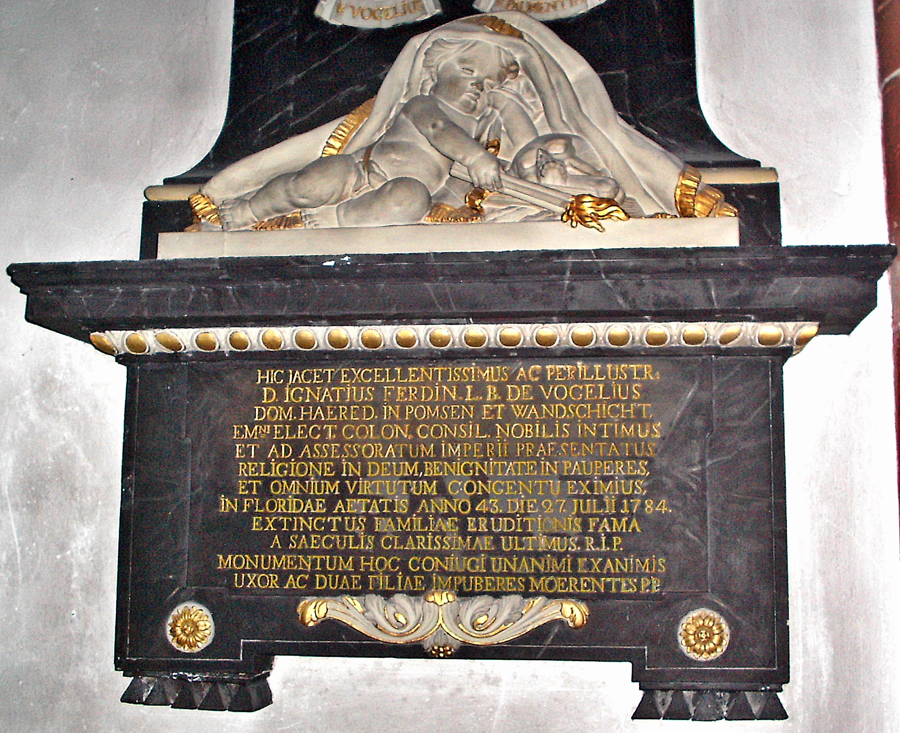 Inschrift, Epitaph Ignatius Ferdinand von Vogelius (1740-1784), kurkölnischer Geheimer Rat, Ortsherr zu Wattenheim, Pfalz; in der Liebfrauenkirche zu Worms